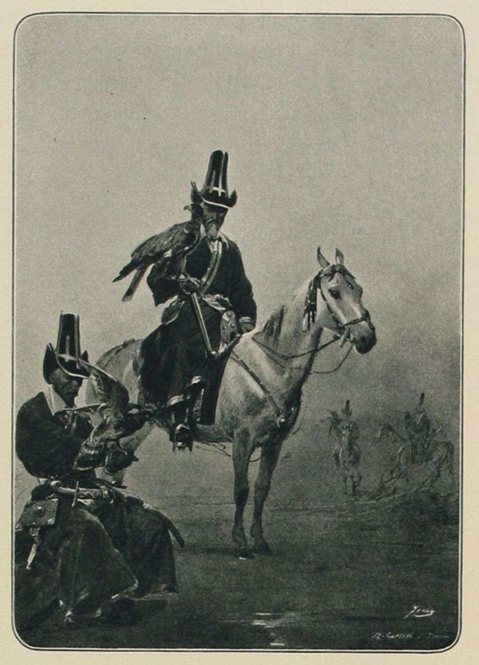 В 1856 году Фахретдин Ишмухаметович Уметбаев возглавил башкирскую делегацию на коронации императора Александра II в Москве. За организацию охоты ловчими птицами во время коронации император Александр II подарил Фахретдину Уметбаеву бриллиантовый перстень. Сцена охоты ловчими птицами вошла в коронационный альбом императора Александра II в виде рисунка под названием "Охота башкир с соколами в присутствии императора Александра II". Рисунок М. И. Зичи под названием "Башкиры с соколами" был опубликован в 1911 году в 4 томе очерка «Великокняжеская, царская и императорская охота на Руси» Н. И. Кутепова.